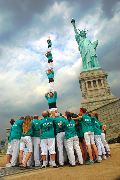 Pilar de 5 fet el 22 de Juny a l'Estatua de la LLibertat pels Castellers de Vilafranca